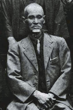 屋部憲通(Yabu Kentsu, 1866 - 1937)